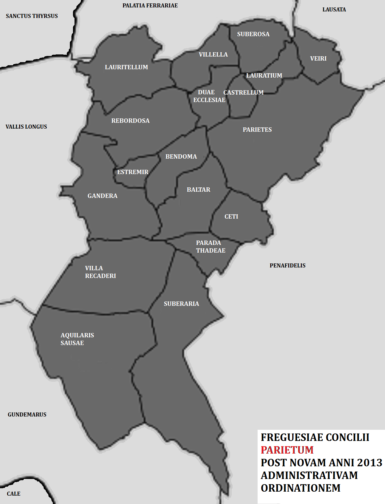 Concilii Parietum freguesiae post novam anni 2013 ordinationem administrativam.